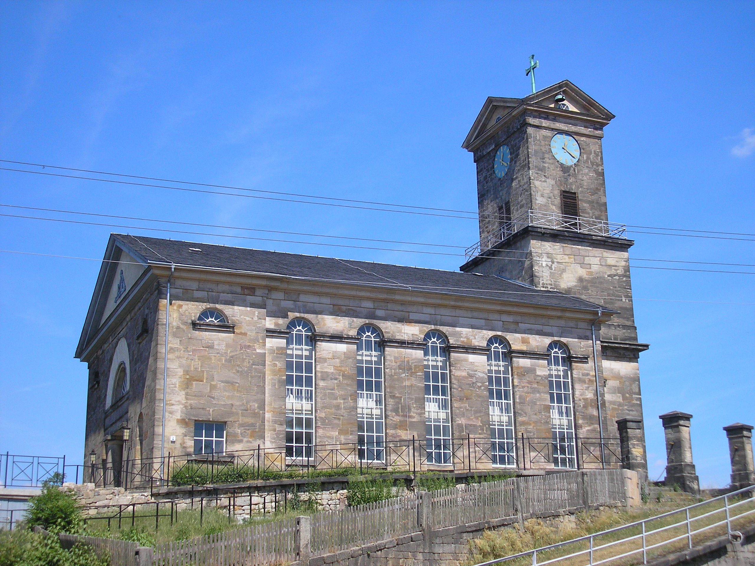 Die Kirche in Gräfinau-Angstedt (Thüringen).